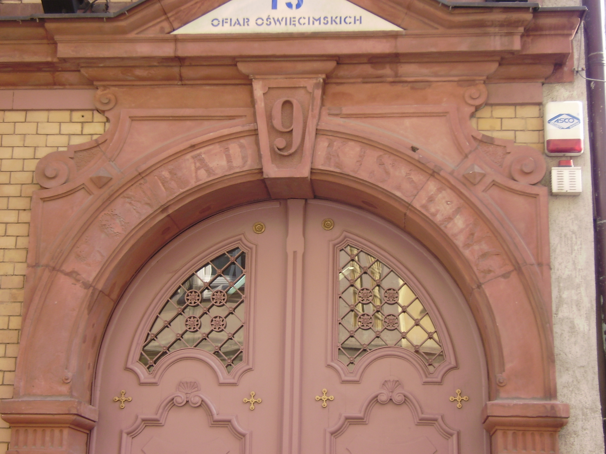 Eingang des ehemaligen Brauereilokals von Conrad Kißling in der Junkernstraße 15/17 in Breslau